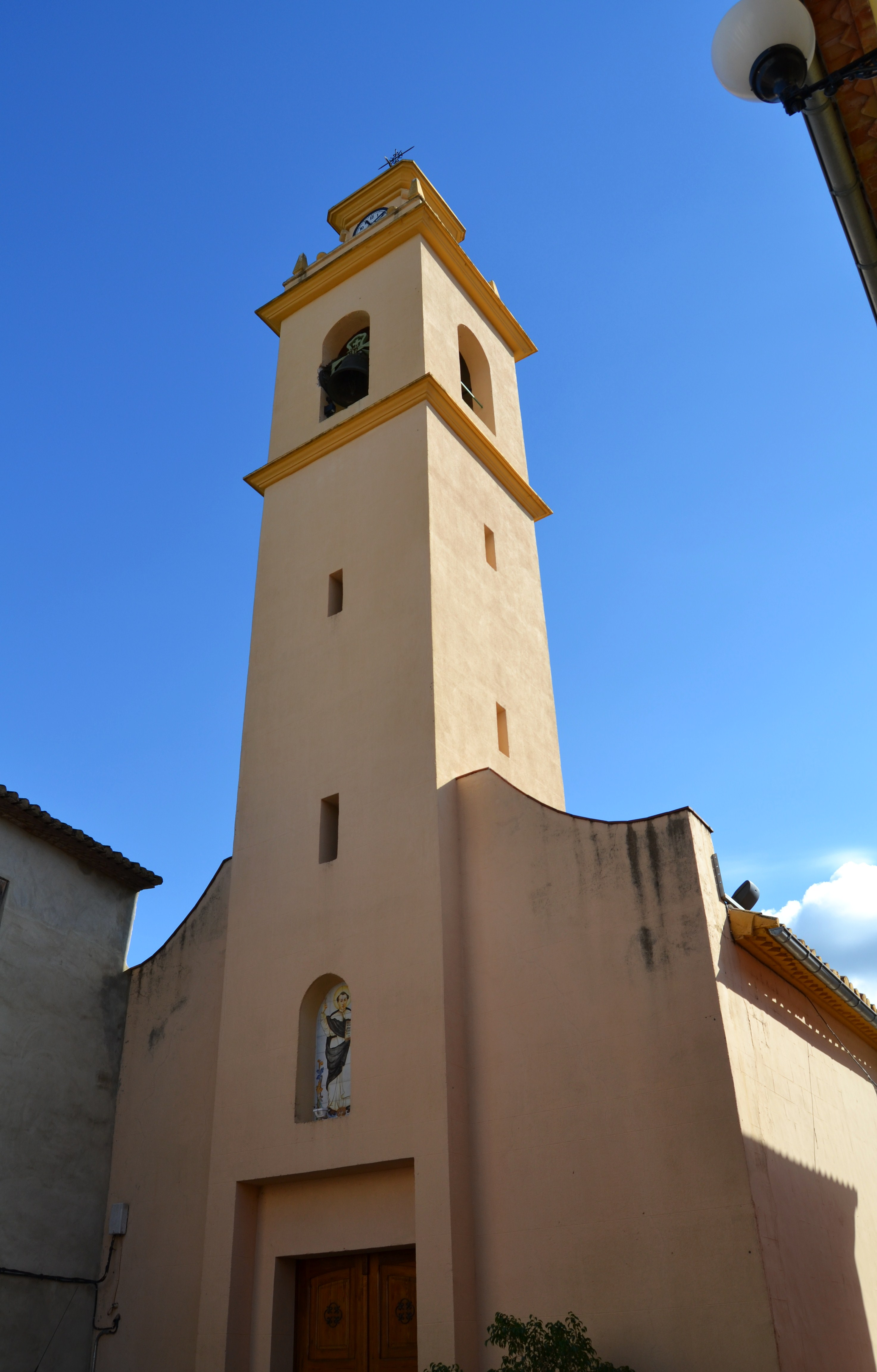 Església de sant Vicent Ferrer de l'Atzúvia. 30.001-003.